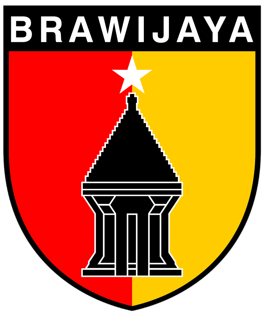 Gambar ini adalah Lambang Kodam V/Brawijaya